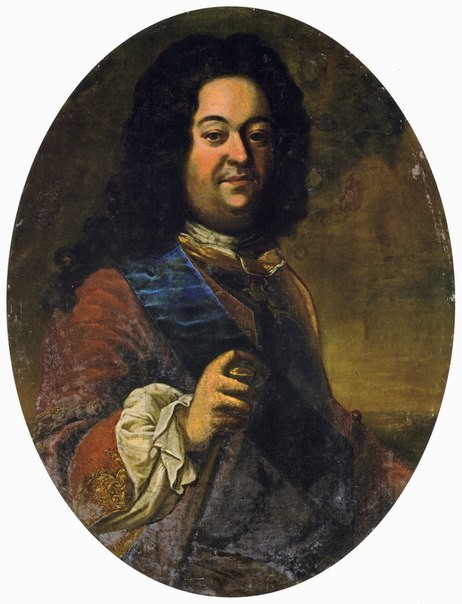 Граф Николай Фёдорович Головин (1695–1745)